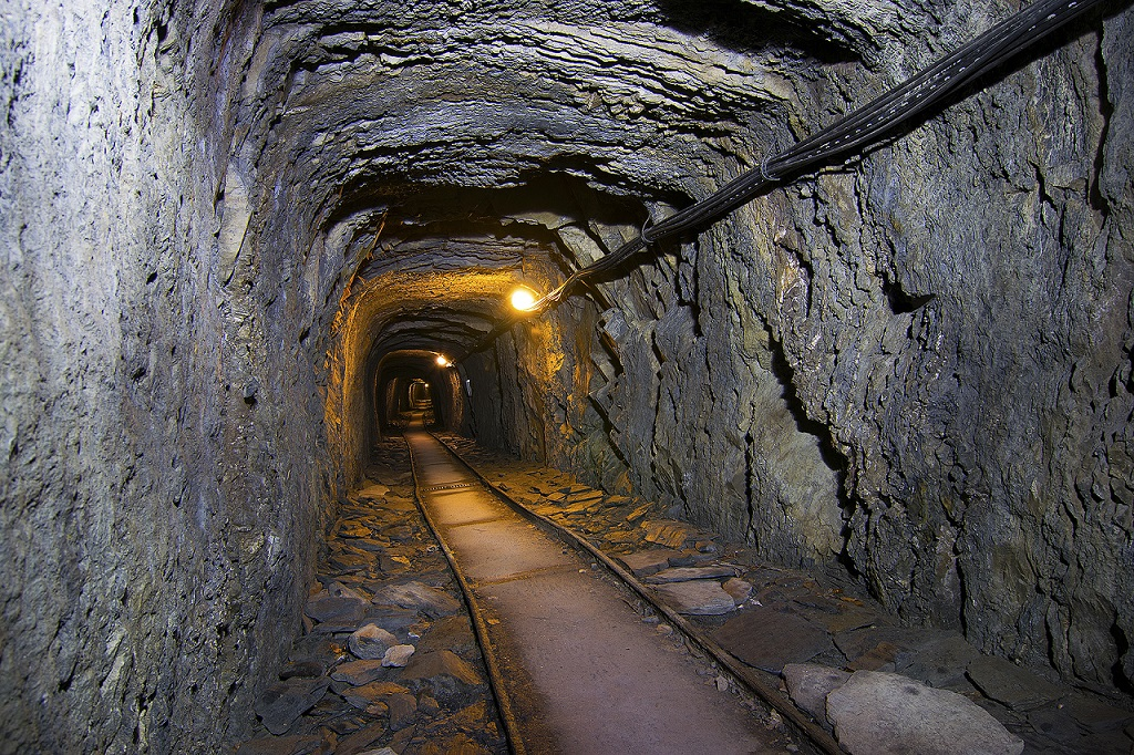 Stollen im Besucherbergwerk Fell - Grube Hoffnung